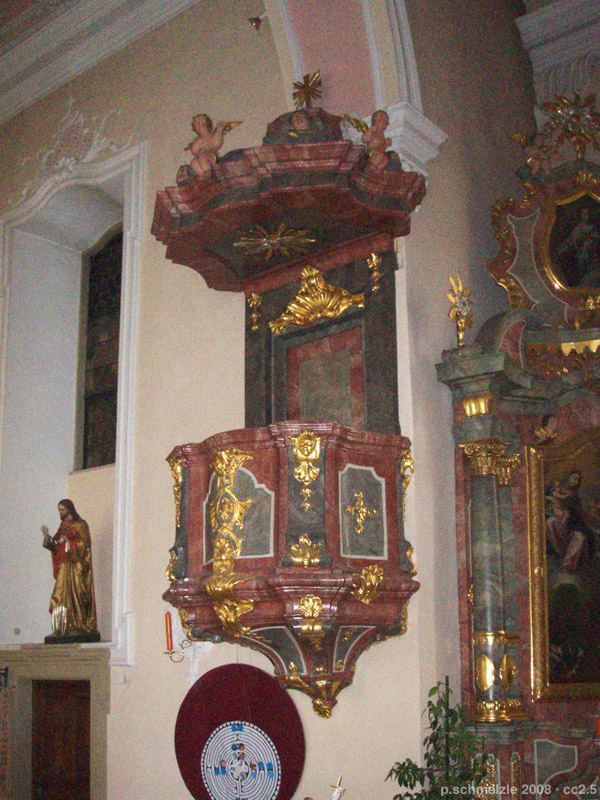 Barocke Kanzel in der Pfarrkirche St. Laurentius in Neudenau